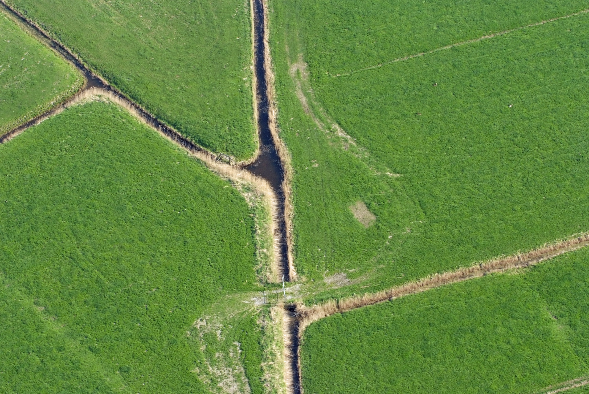 Fotoflug von Nordholz-Spieka nach Oldenburg und Papenburg